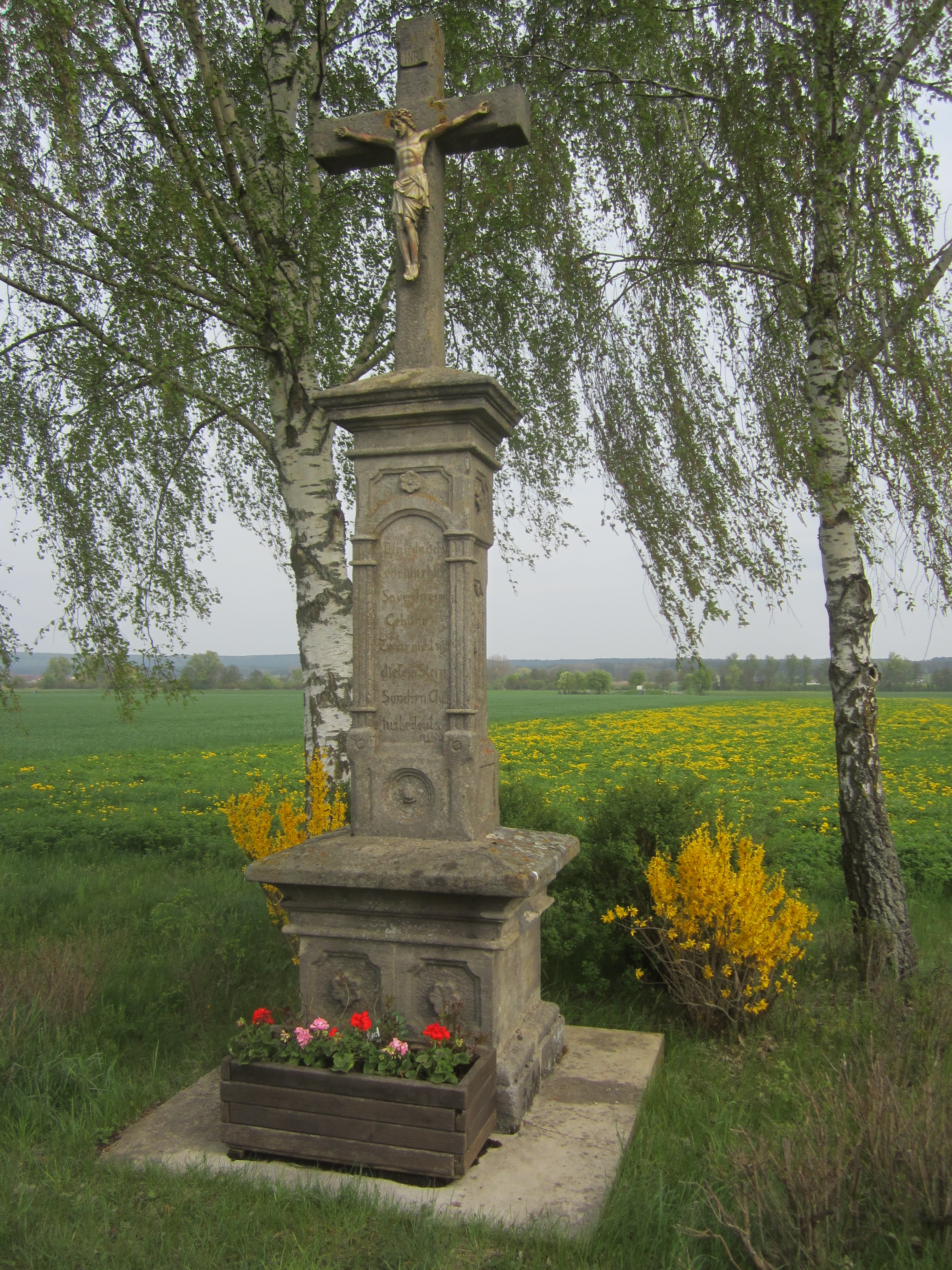 Bildstock bei Uttstadt in der Gemeinde Adelsdorf